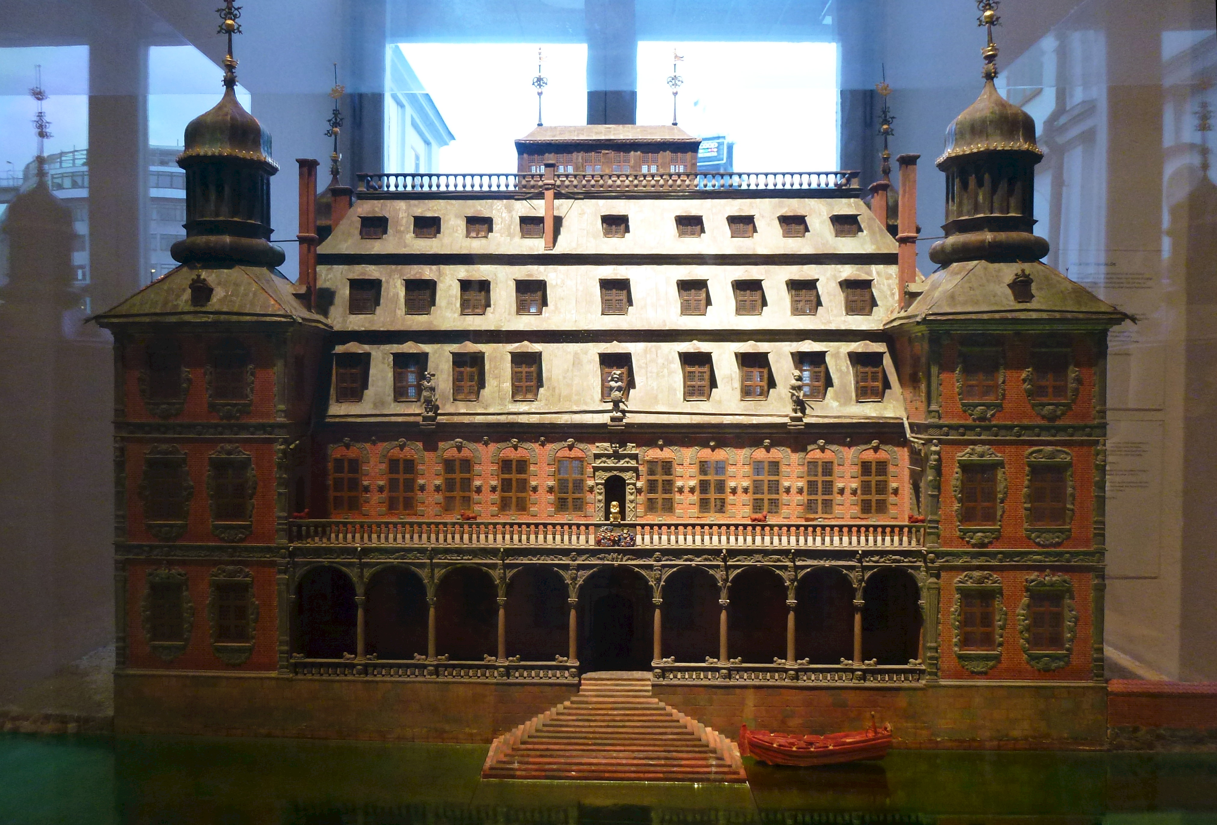 Stockholms stadsmuseum, äldre modell av palatset Makalös